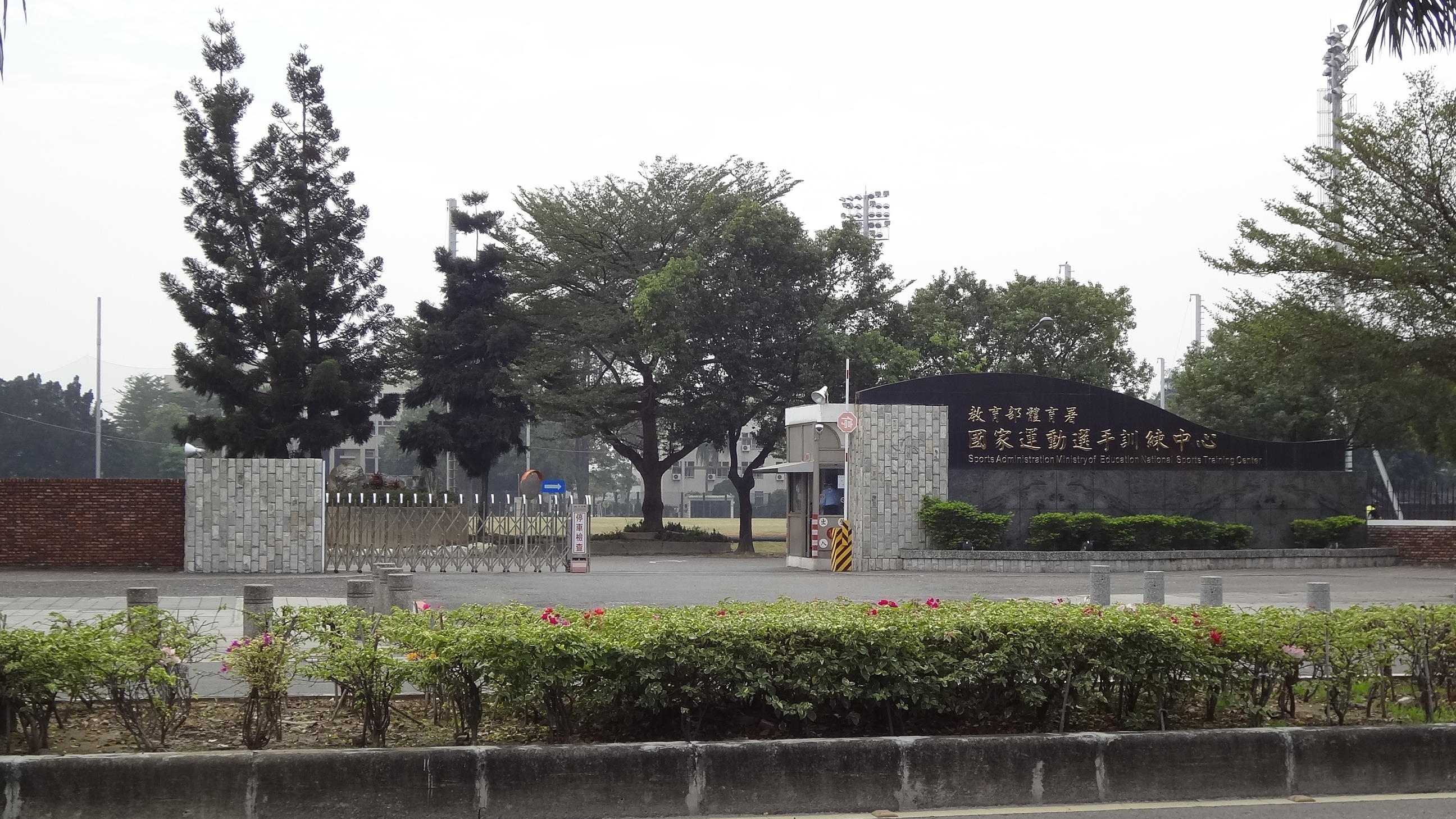 中華民國教育部體育署國家運動選手訓練中心，位於高雄市左營區世運大道1號。